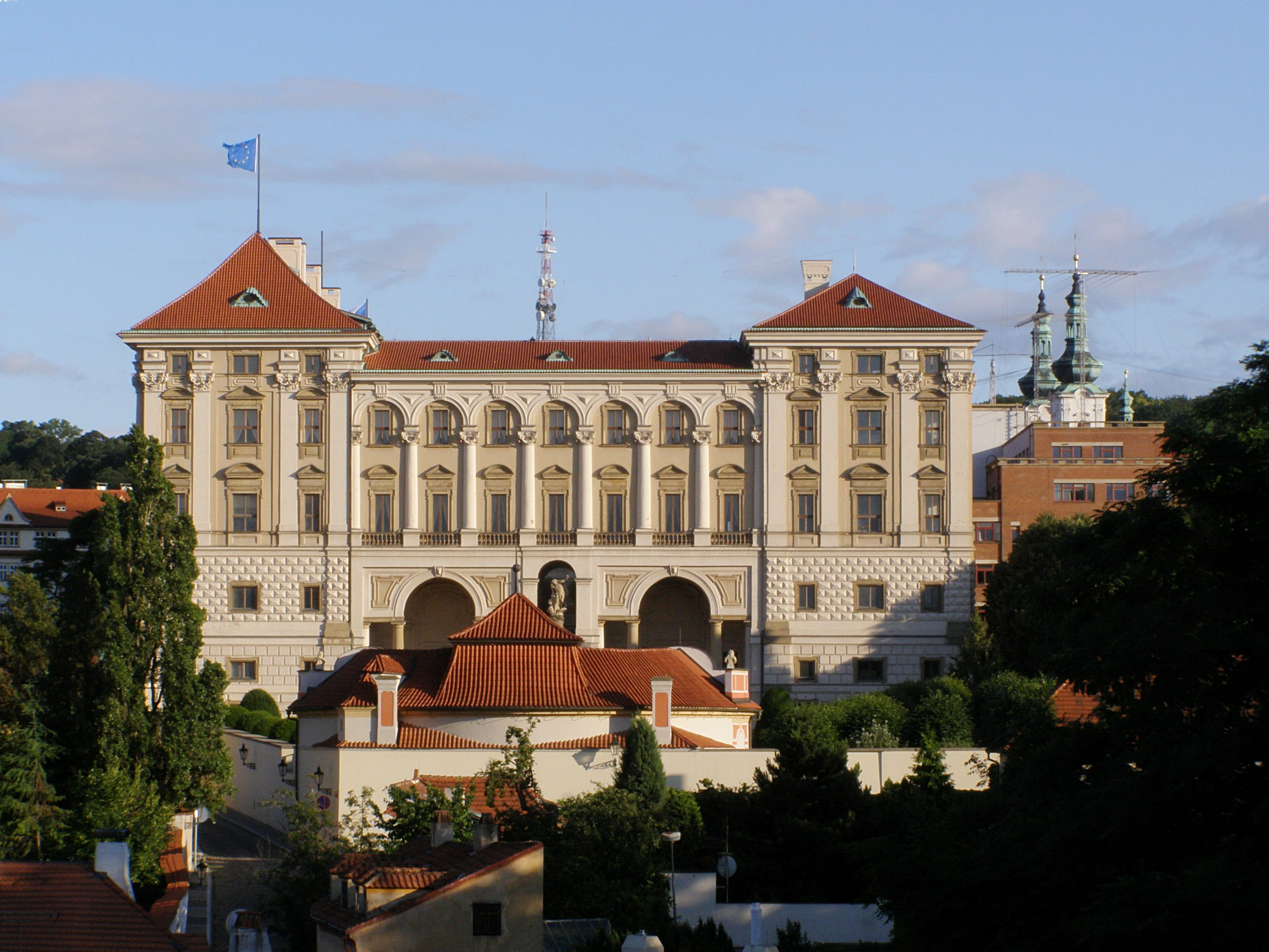 Praha, Hradčany,Černínský palác, před ním letohrádek v Černínské zahradě, v pozadí vpravo věže Strahovského kláštera, pohled od severu